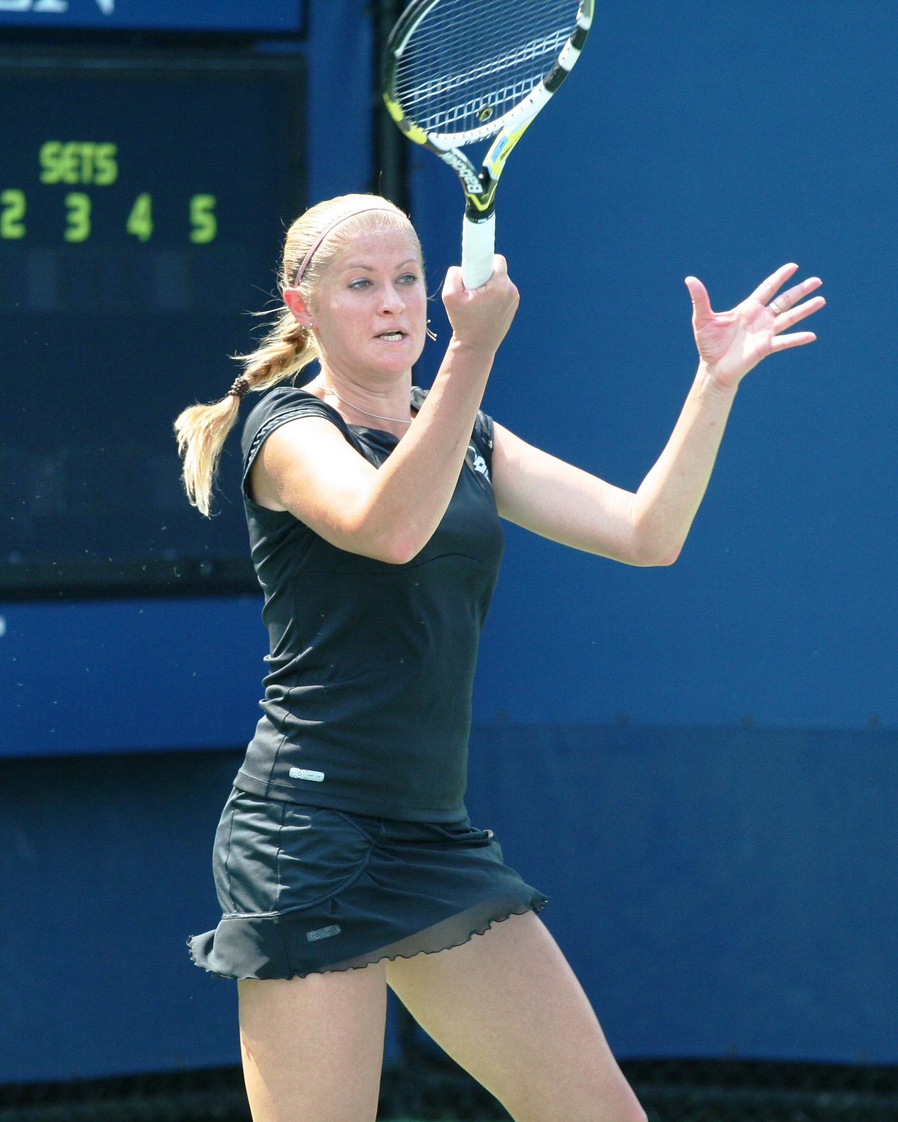 U.S. Open Wednesday, Sept. 1, 2010